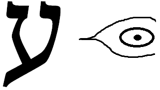 Hebrew letter ayin schema